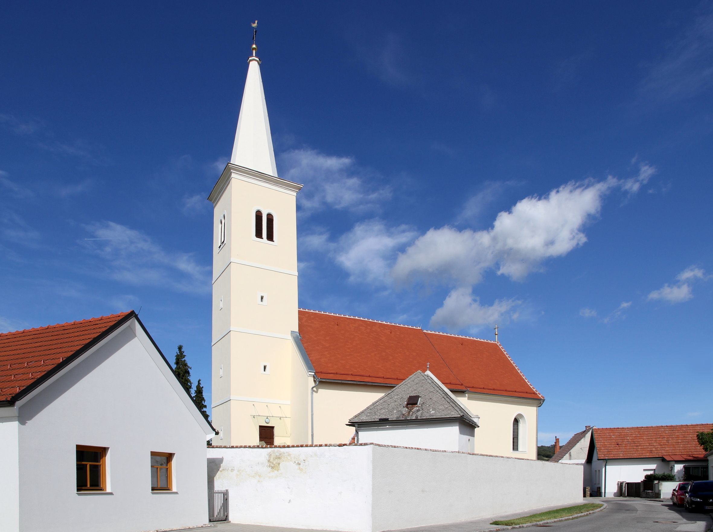 Katholische Pfarrkirche hl. Jakobus d. Ä der burgenländischen Gemeinde Ritzing. Ein kleiner, im Kern mittelalterlicher Bau mit einem Chor aus dem 15. Jahrhundert. Die Kirche wurde um 1640 bis 1647 barockisiert. Der Westturm mit Steinhelm stammt aus dem 17. Jahrhundert.